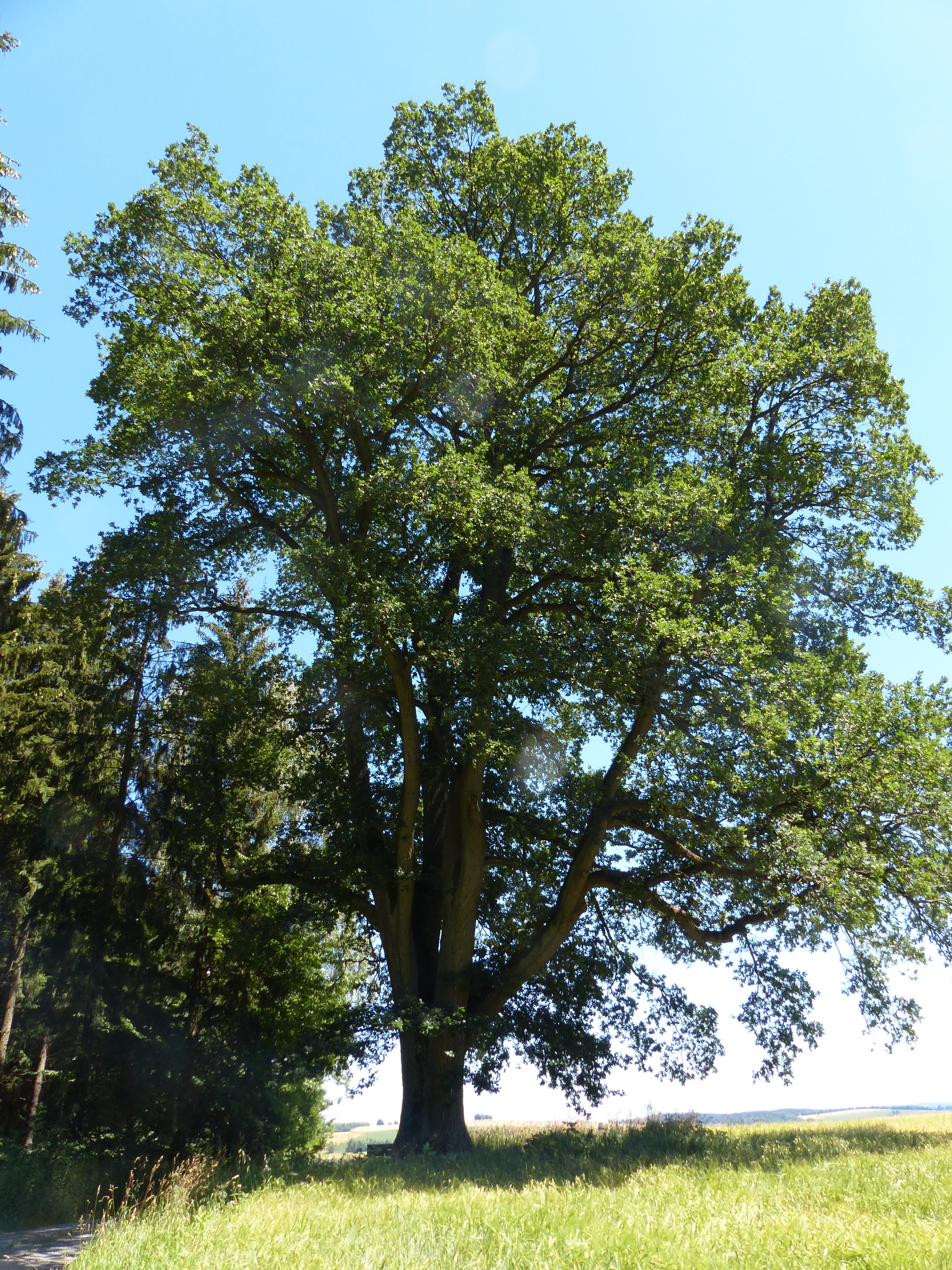 Naturdenkmal Bismarckeiche beim Untreusee